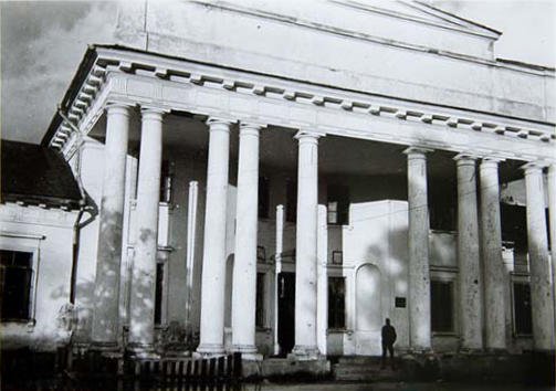 Беларуская (тарашкевіца): Лагойск (Łahojsk), палац Тышкевічаў (Tyškievič)